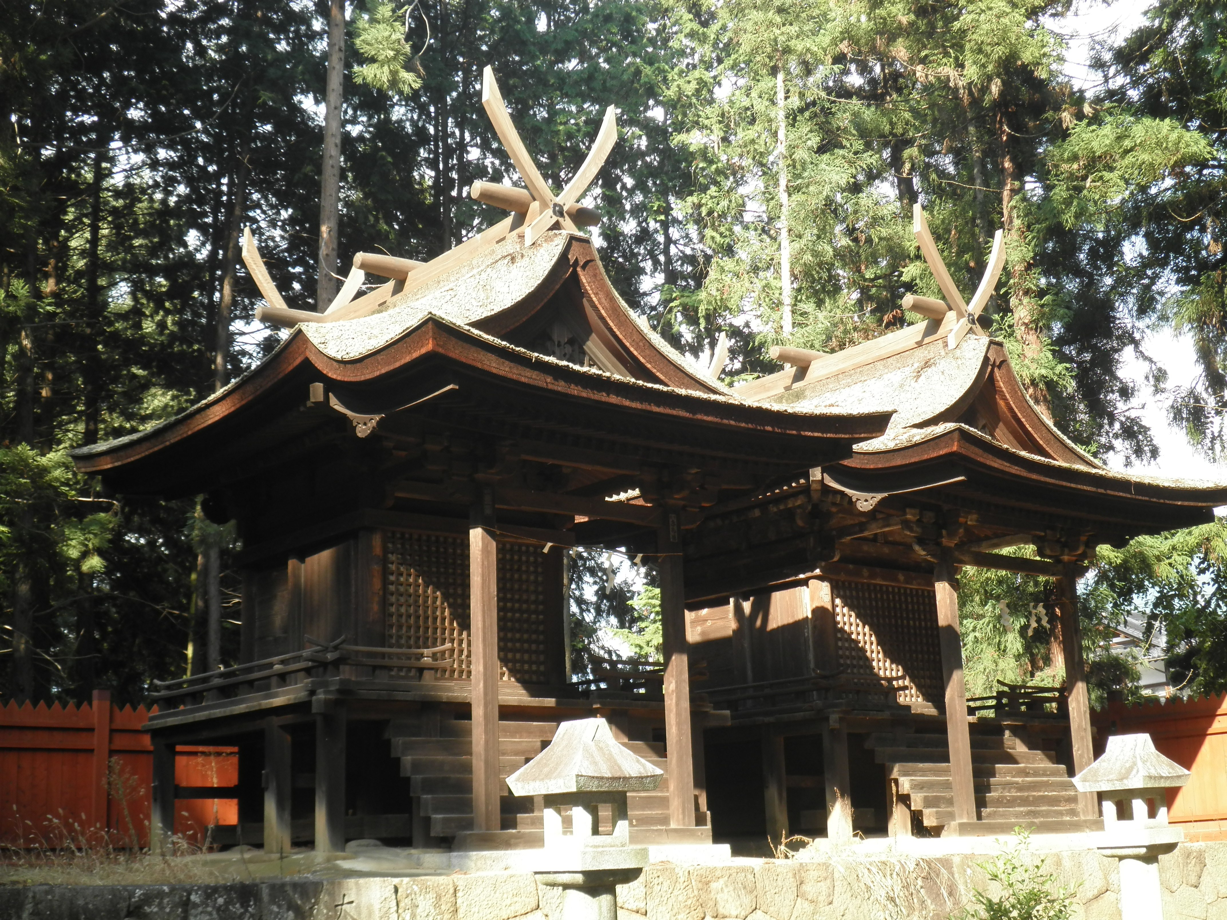 甲州市・熊野神社の本殿